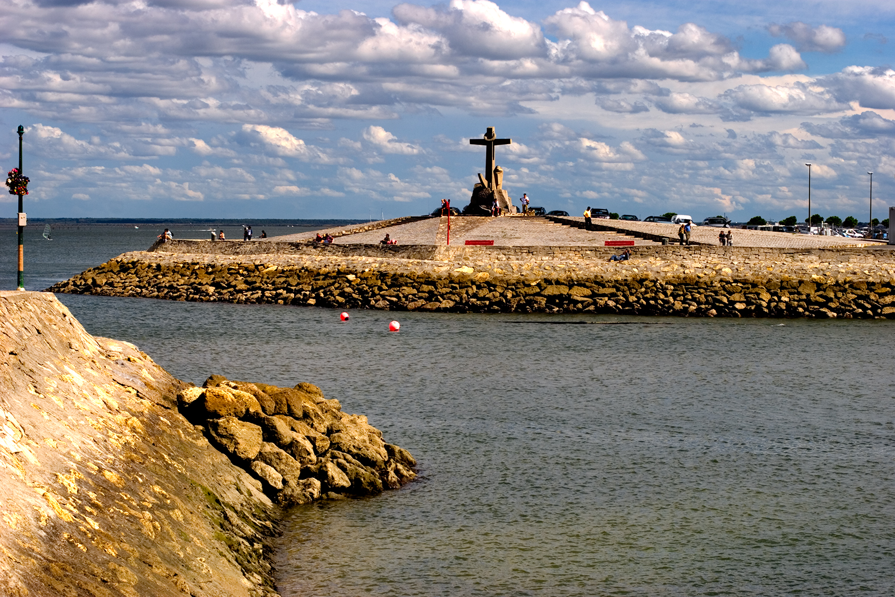 Port d'Arcachon (Gironde, France).